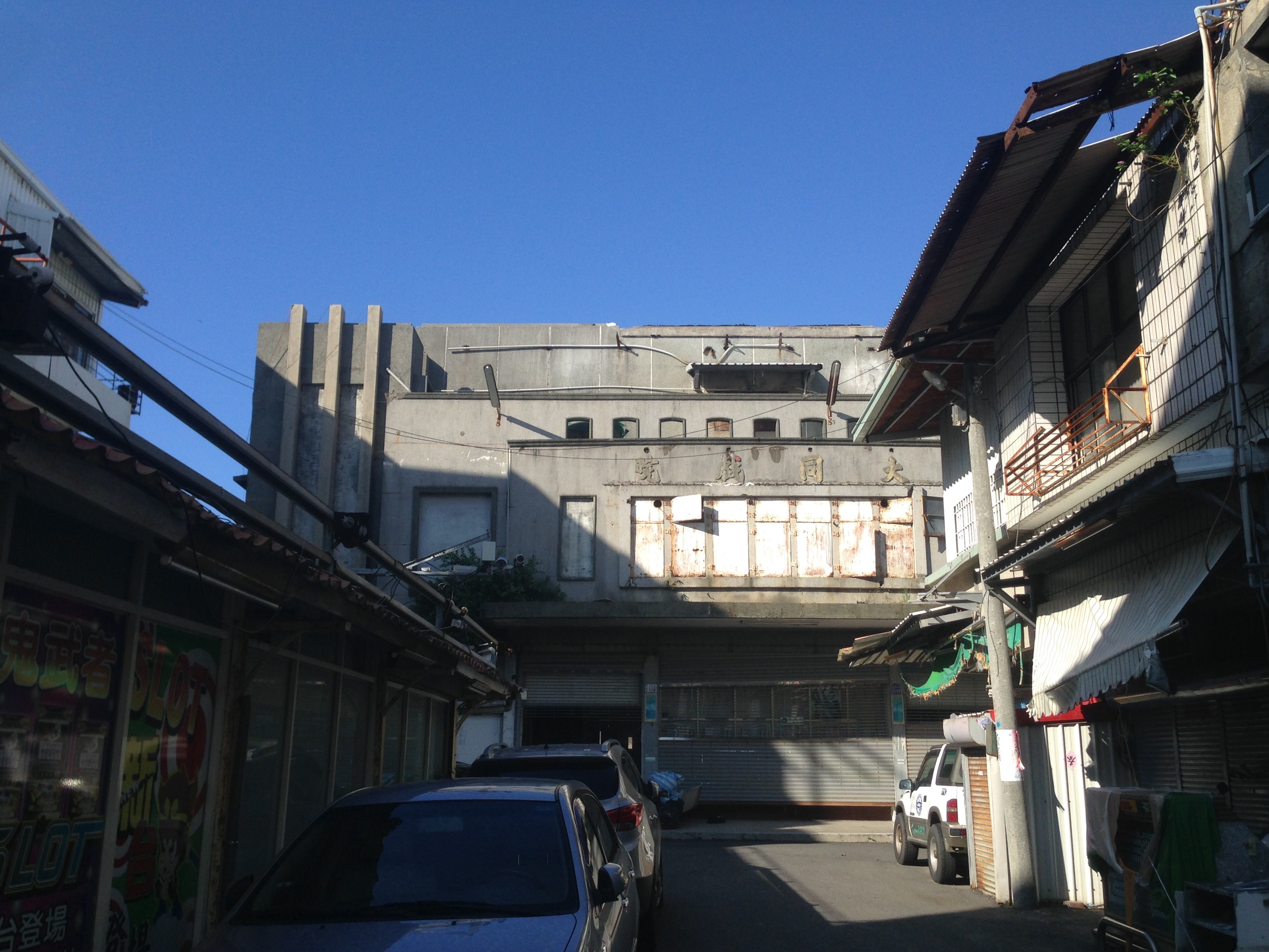 中文（台灣）: 巷弄中的台東大同戲院